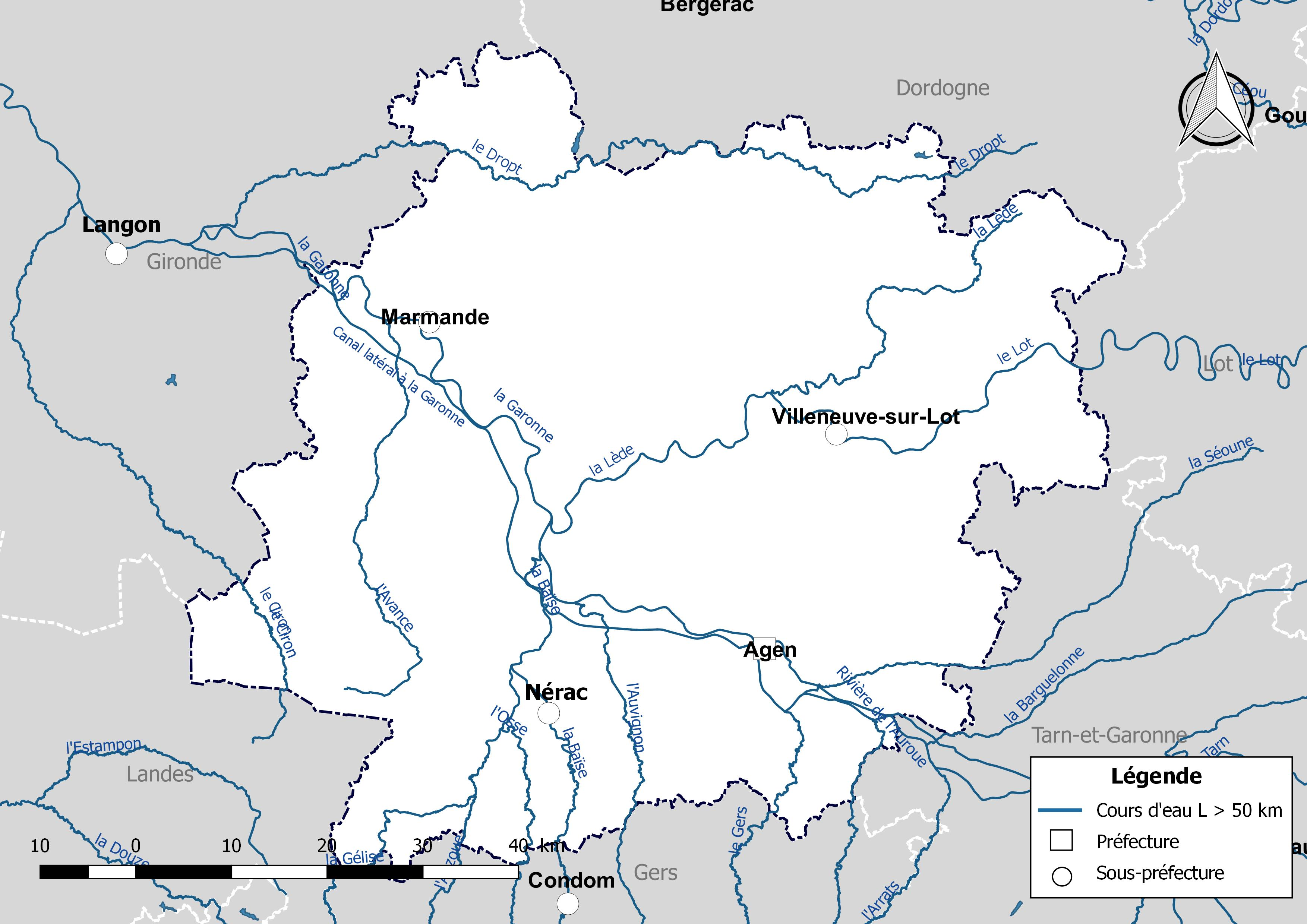 Carte des cours d'eau de longueur supérieure à 50 km drainant le département de Lot-et-Garonne (France).